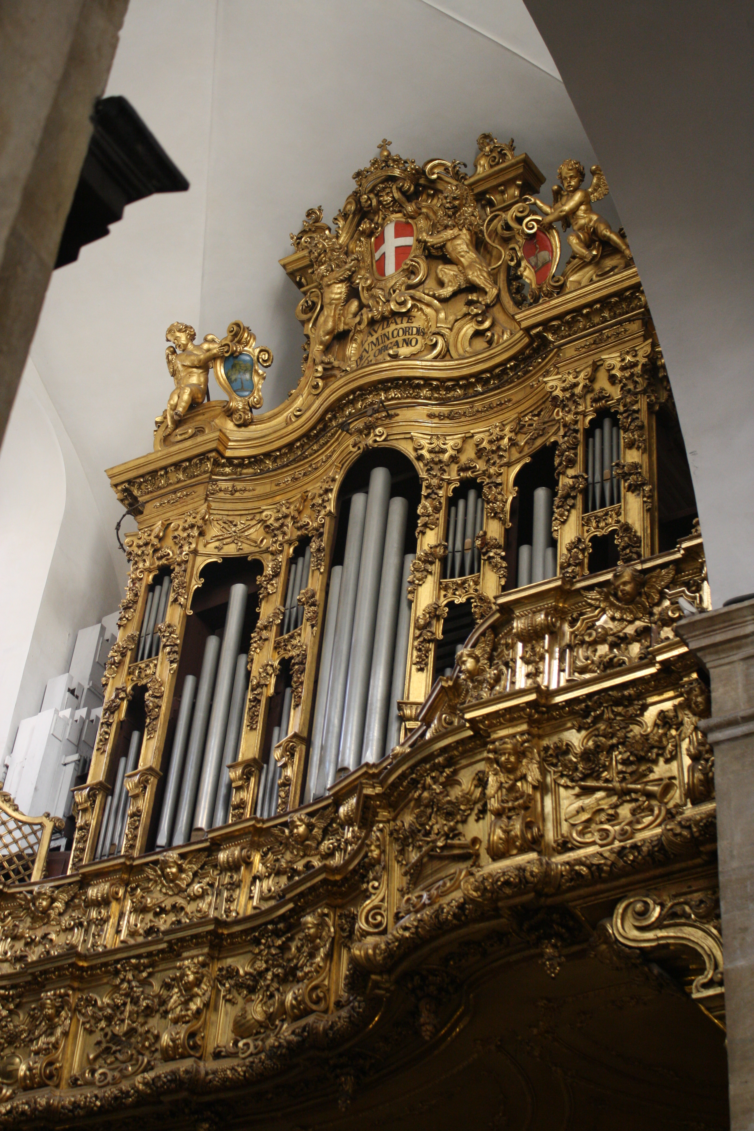 L'organo del Duomo di Torino, posto nel transetto destro, dalla parte opposta rispetto alla cappella della Sacra Sindone.